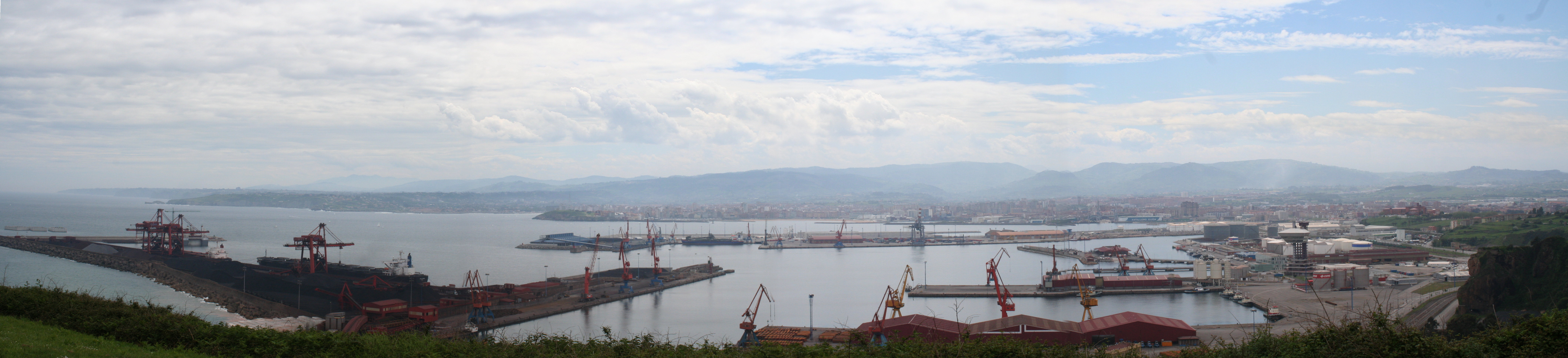 Panorámica del Puerto de Gijón desde la Campa Torres